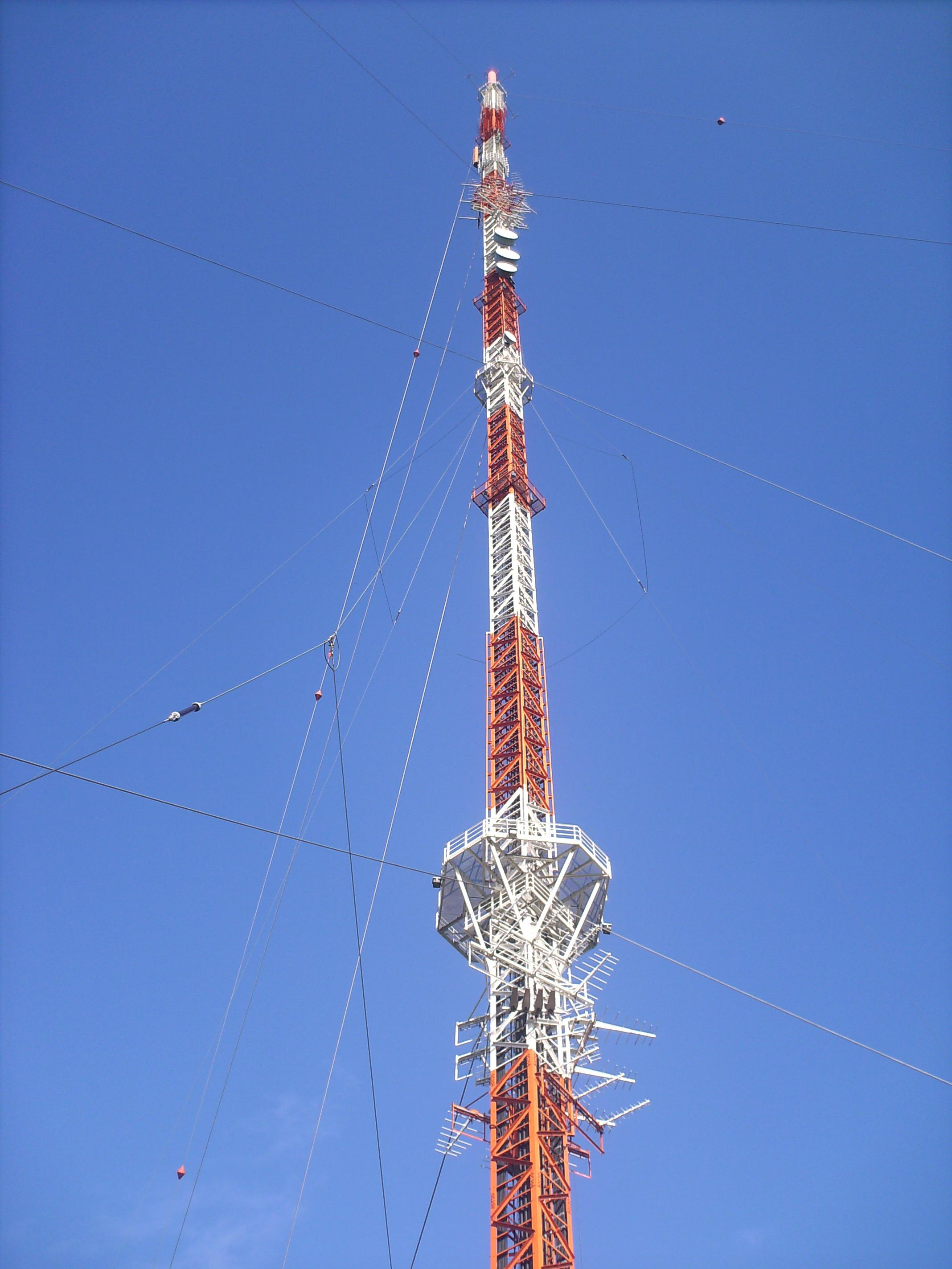 Sendemast Langenberg-Hordt